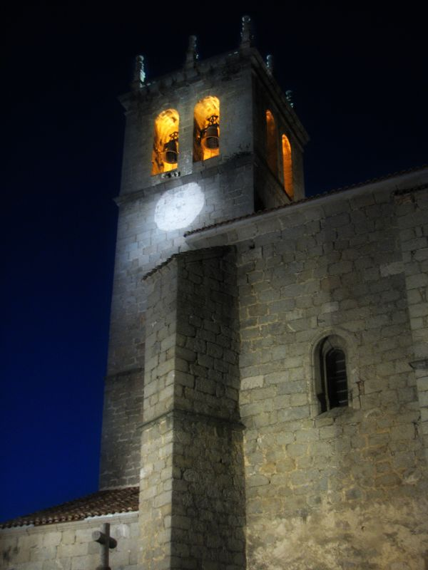 Vista nocturna del campanario de Robledo de Chavela